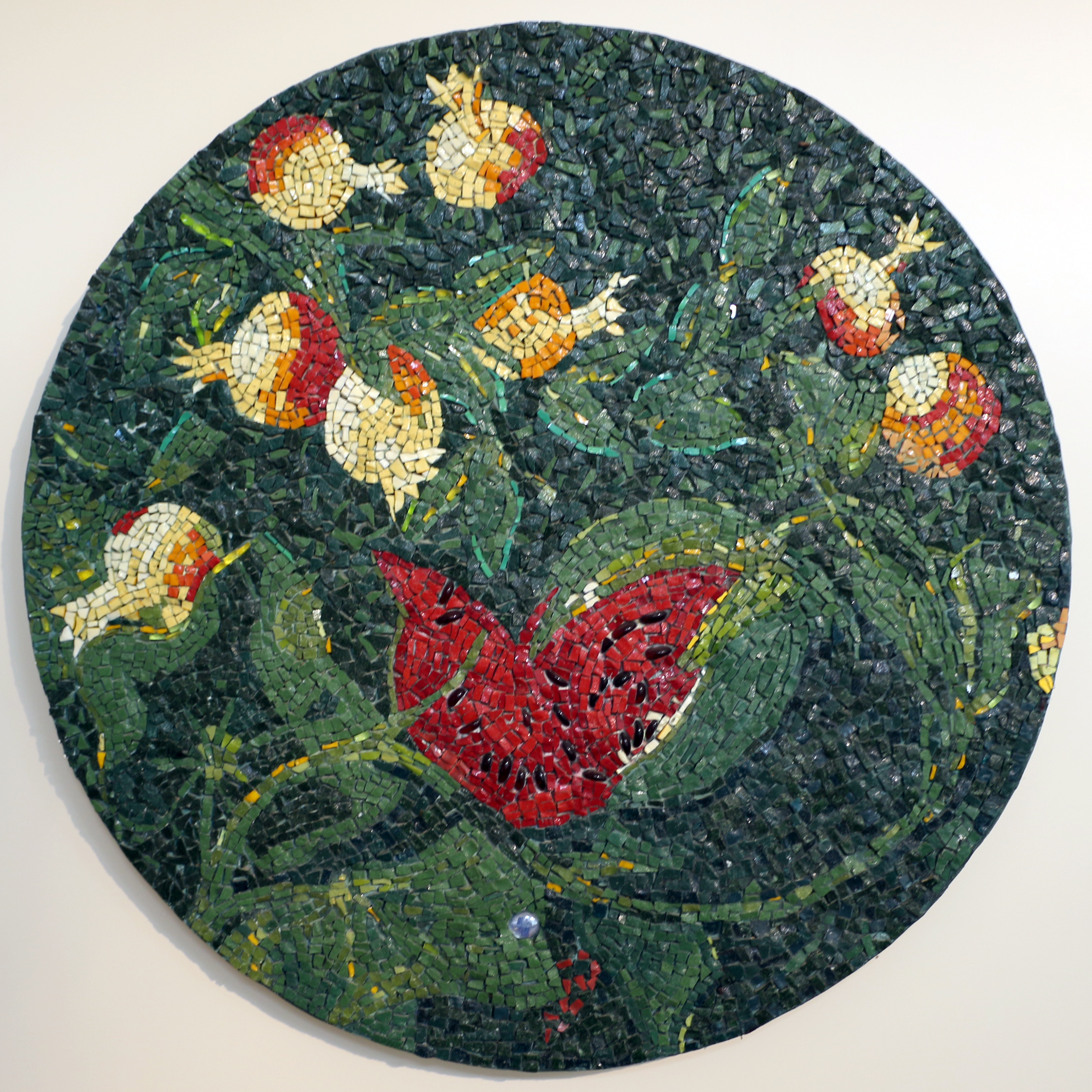 Collezione Mosaici Moderni - NB: Museum explicitly authorized the upload of its contemporary art collection for WLM 2016 (for further info ask WLM Italy organizators). This is a photo of a monument which is part of cultural heritage of Italy.